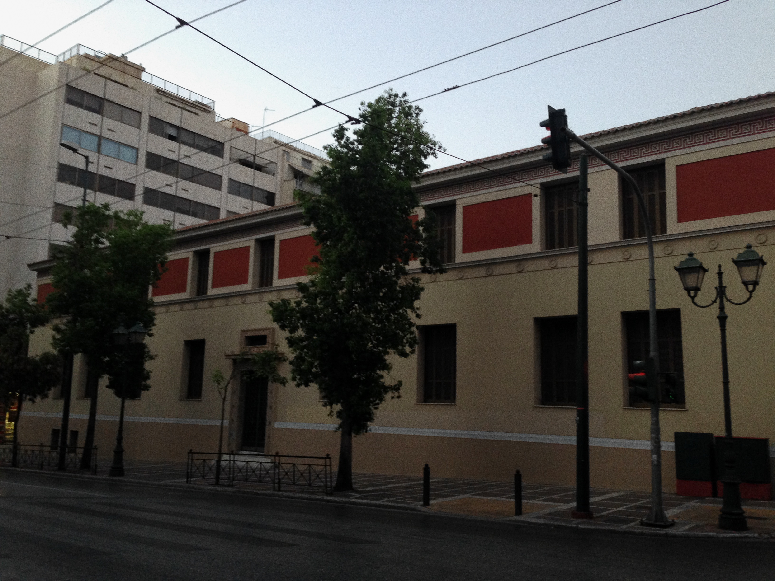 I